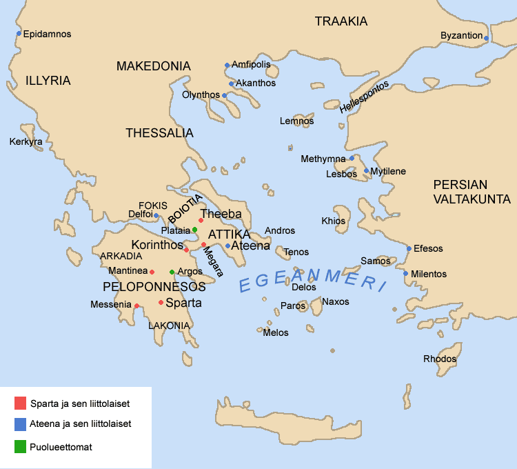 Peloponnesolaissota.